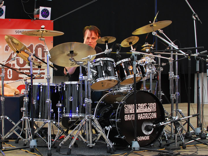 Gavin Harrison (Sonor Days 2010)